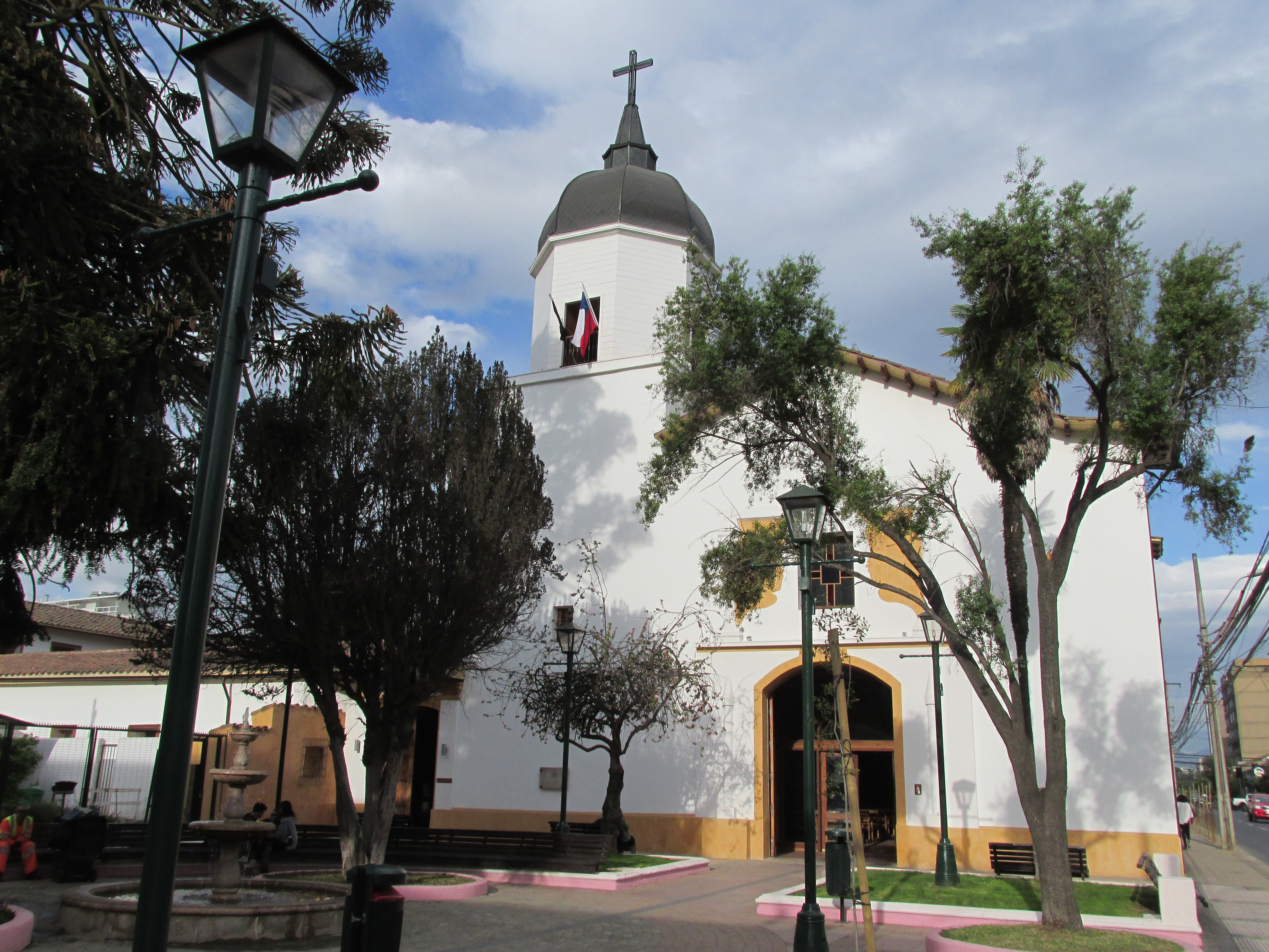 Iglesia La Merced, restaurada en Octubre 2016, después del terremoto del 27 de febrero del 2010, en Chile.